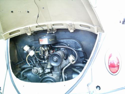 Motor 1300, Volkswagen Fusca 1968.